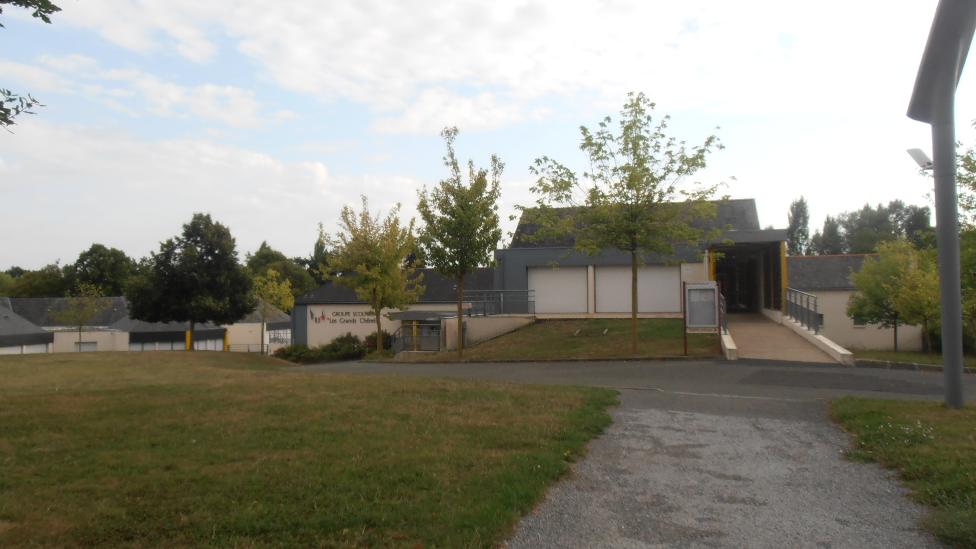 L'ensemble scolaire et la bibliothèque de Saint-Léger-des-Bois (Maine-et-Loire, France).